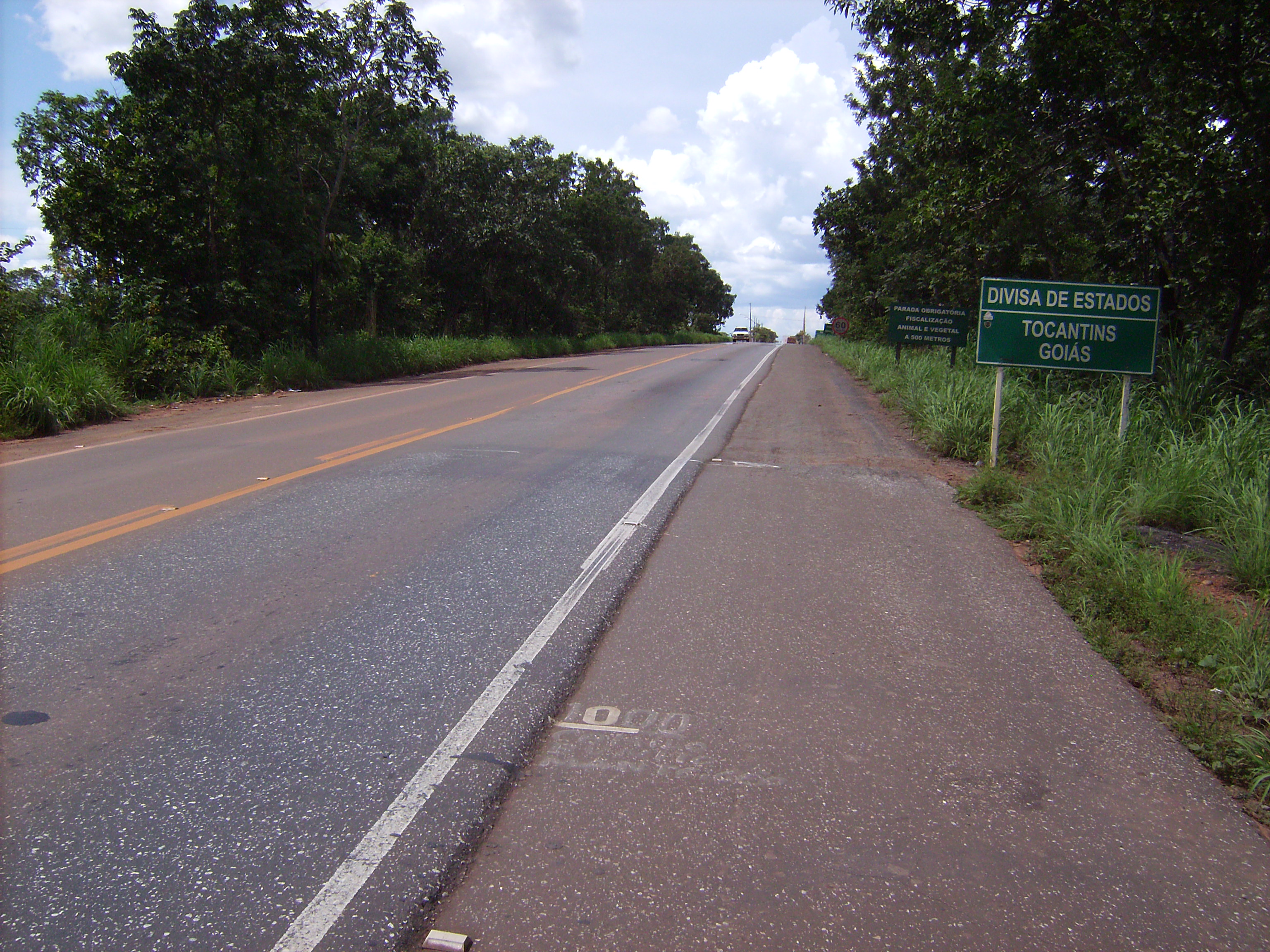 Divisa entre os estados brasileiros de Goiás (para trás) e do Tocantins (em frente) na BR-153.